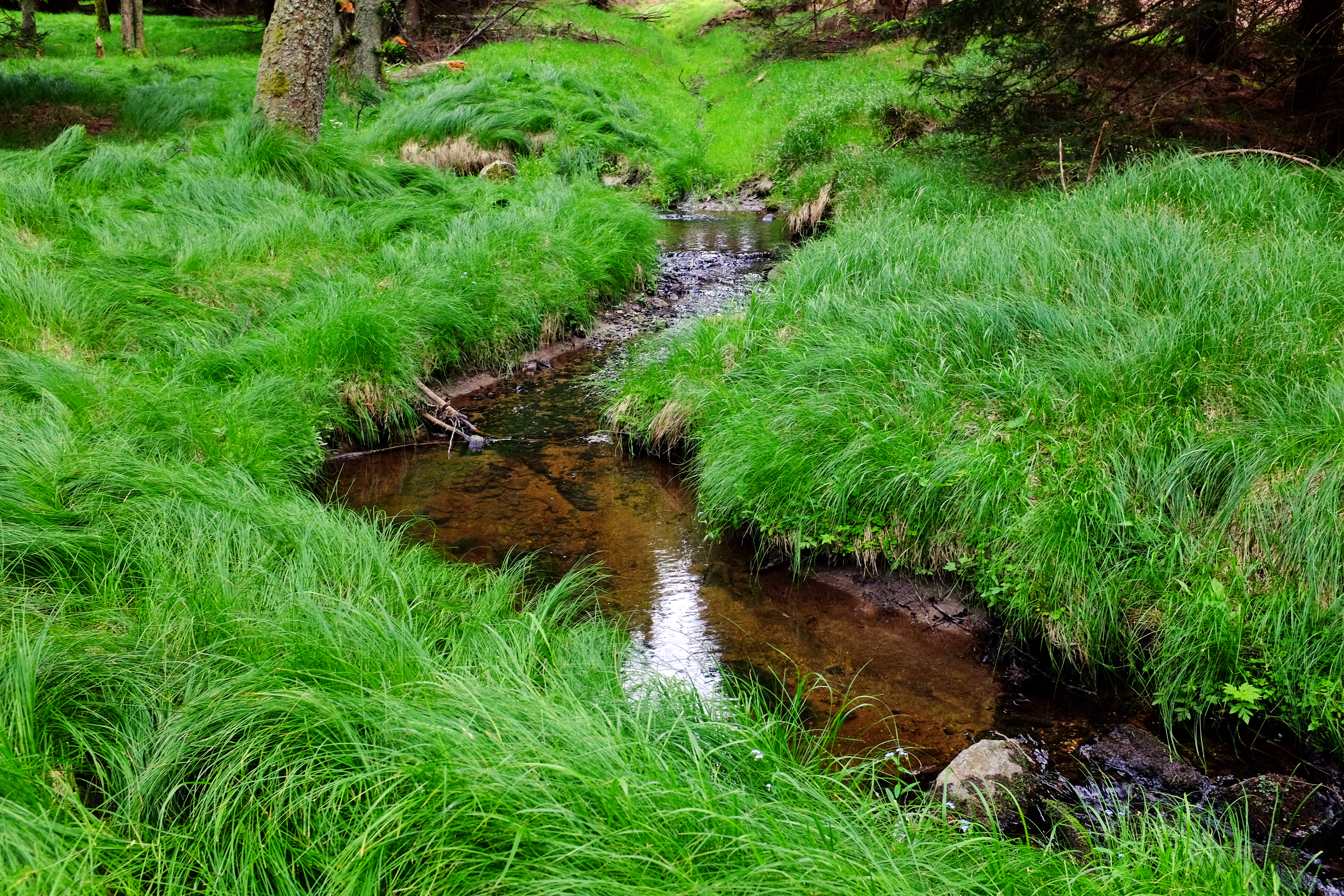 Lužní potok, přítok Rokytnice, okres Cheb